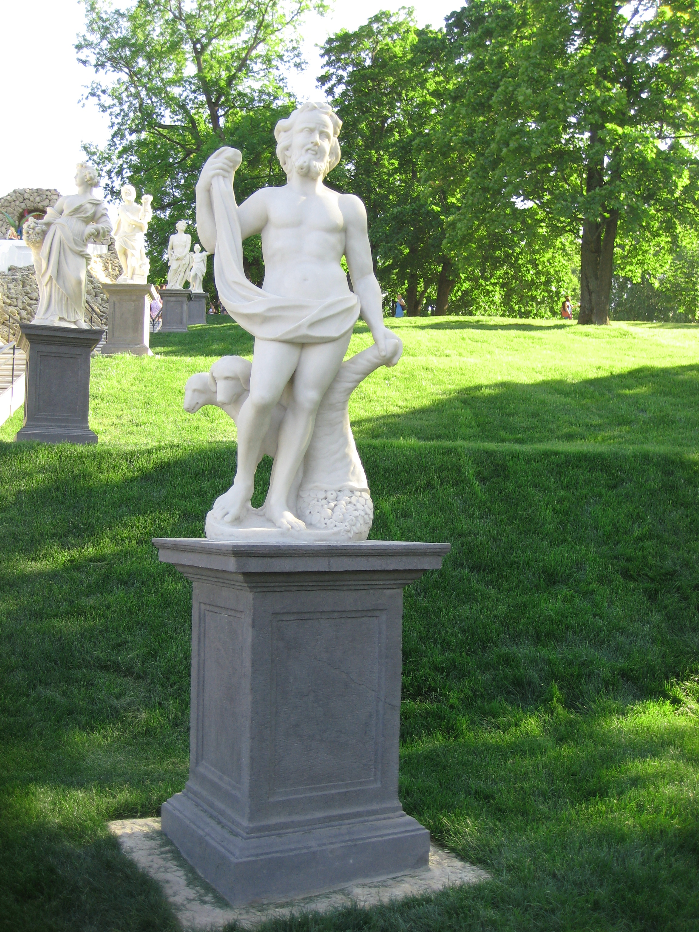 Статуя «Плутон» (Санкт-Петербург, Петергоф, каскад Драконов, западная сторона)